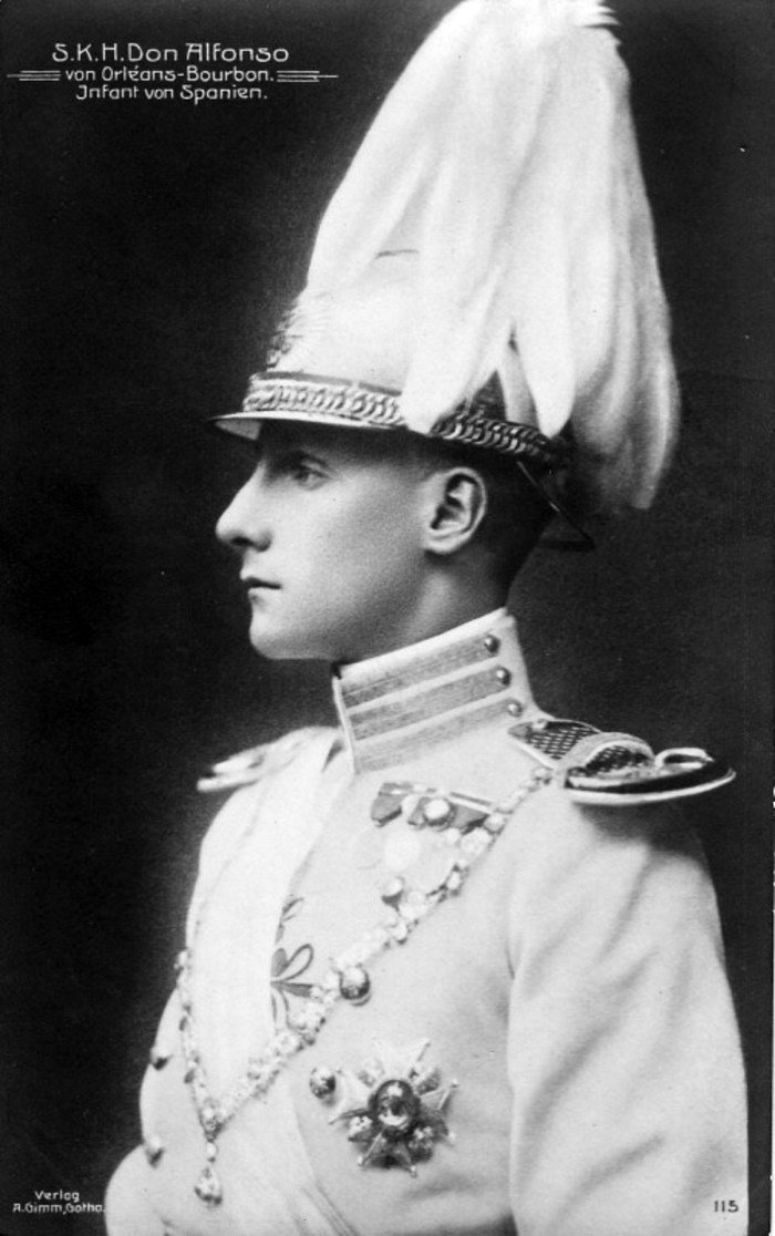 S.K.H. Don Alfonso von Orleans-Bourbon, Infant von Spanien